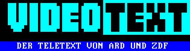 Videotext - Logo des gemeinsamen Teletextes von ARD und ZDF